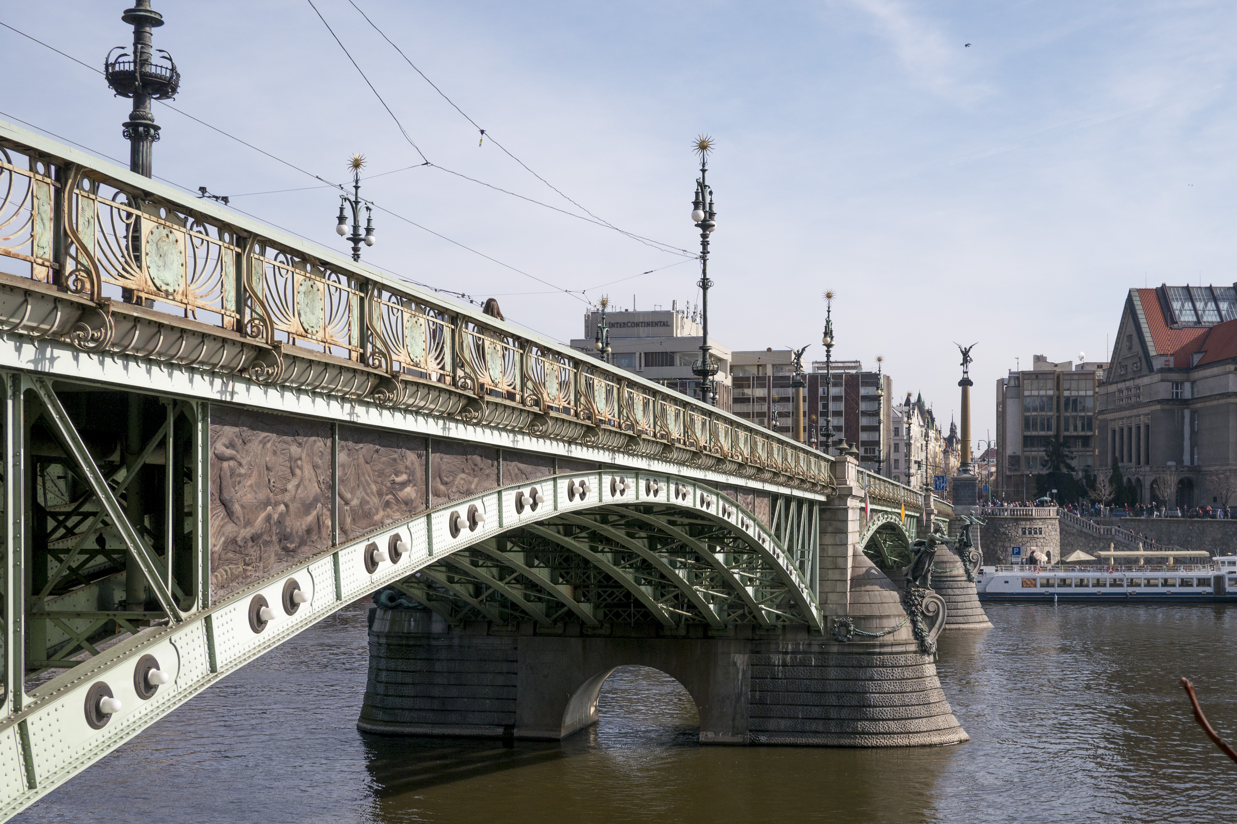 Mánesův most